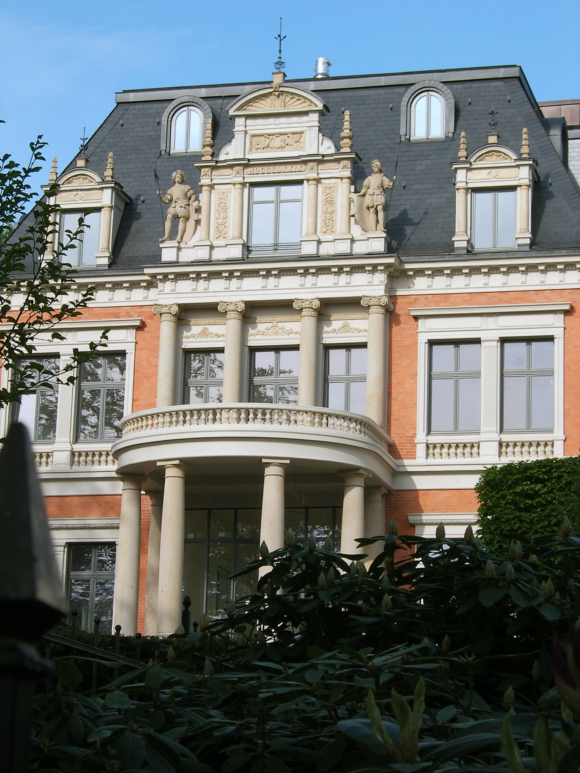 Hamburg, Harvestehude, Alstervilla im Neorenaissance-Stil von 1879, Harvestehuder Weg 7b